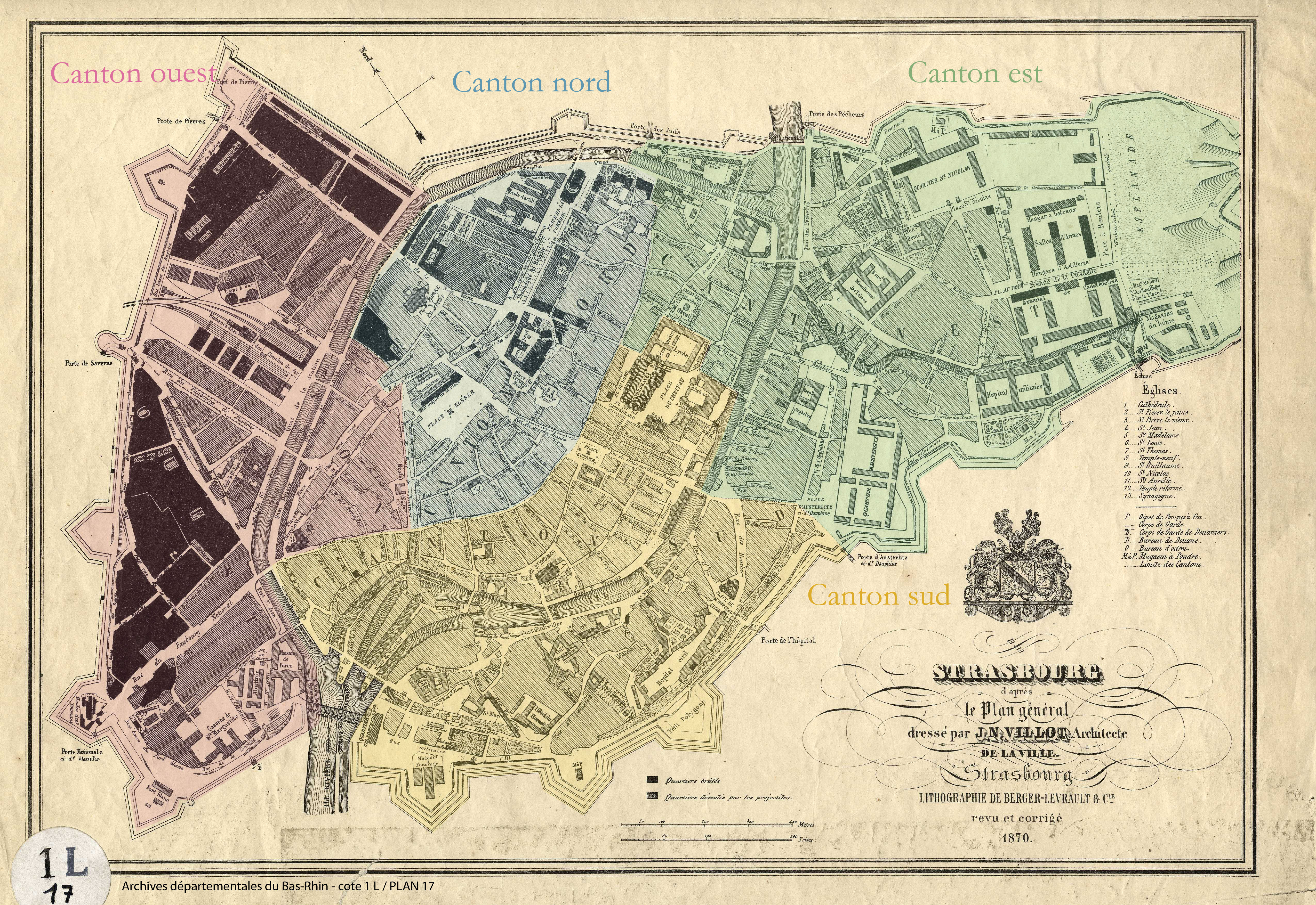 Plan de Strasbourg en 1870